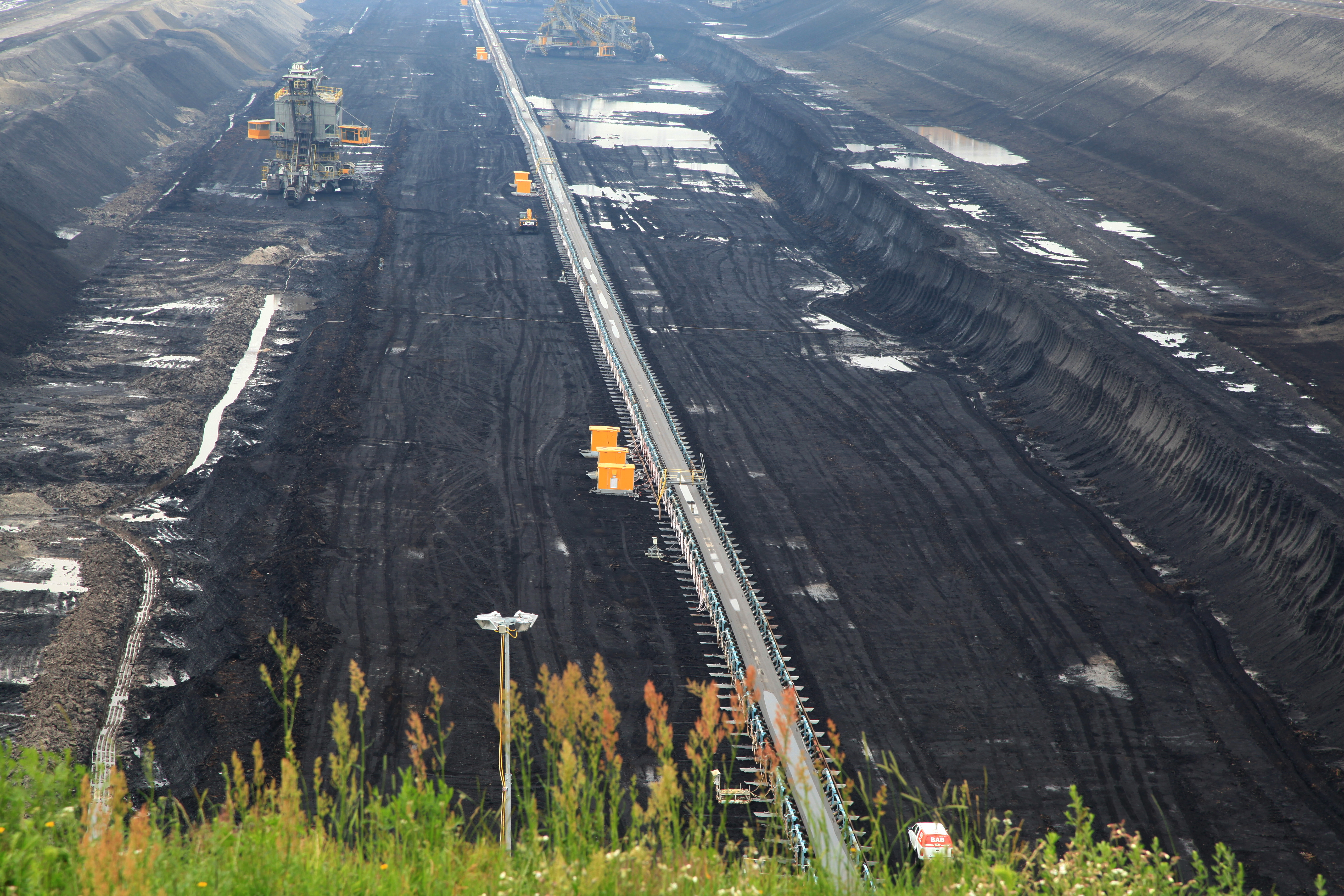 Blick vom Aussichtspunkt Tagebau Reichwalde in Boxberg/O.L.